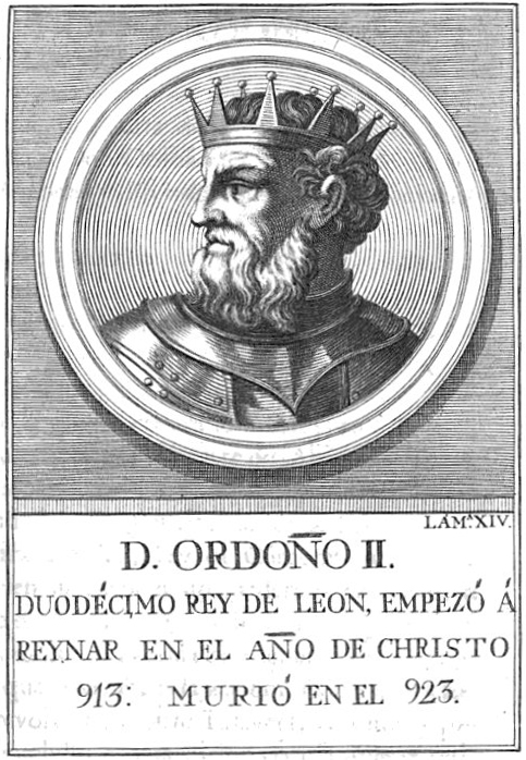 Retrato de Ordoño II, duodécimo rey de León, ilustración del libro (escaneado por Google) Retratos de los reyes de España, desde Atanarico hasta ... D. Carlos III.